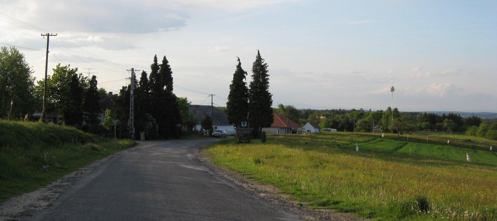 Verice (slovenian name), village in Hungary